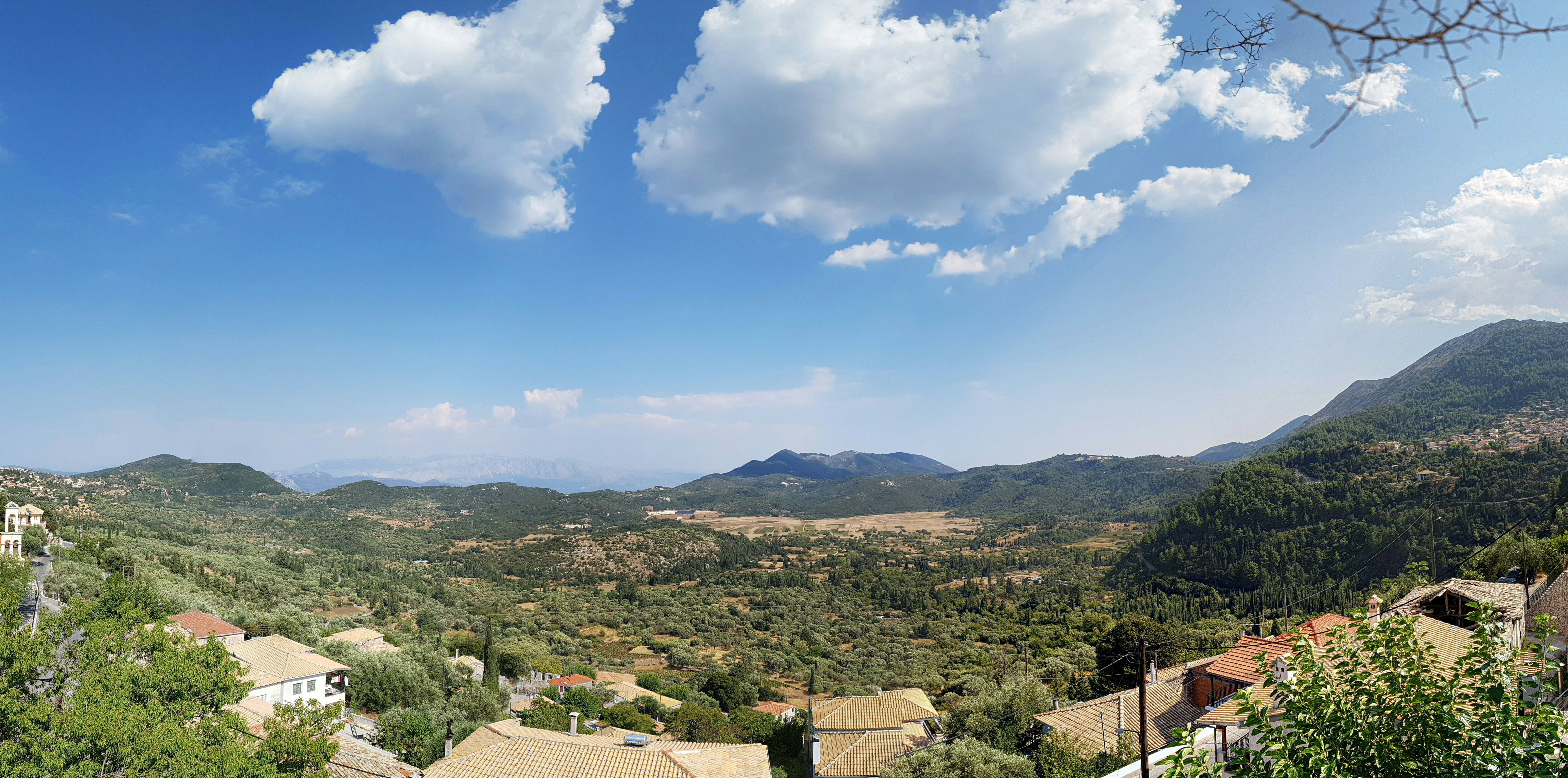 Θέα των Πηγαδησάνων